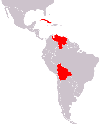 Members of TCP (Tratado de Comercio de los Pueblos)